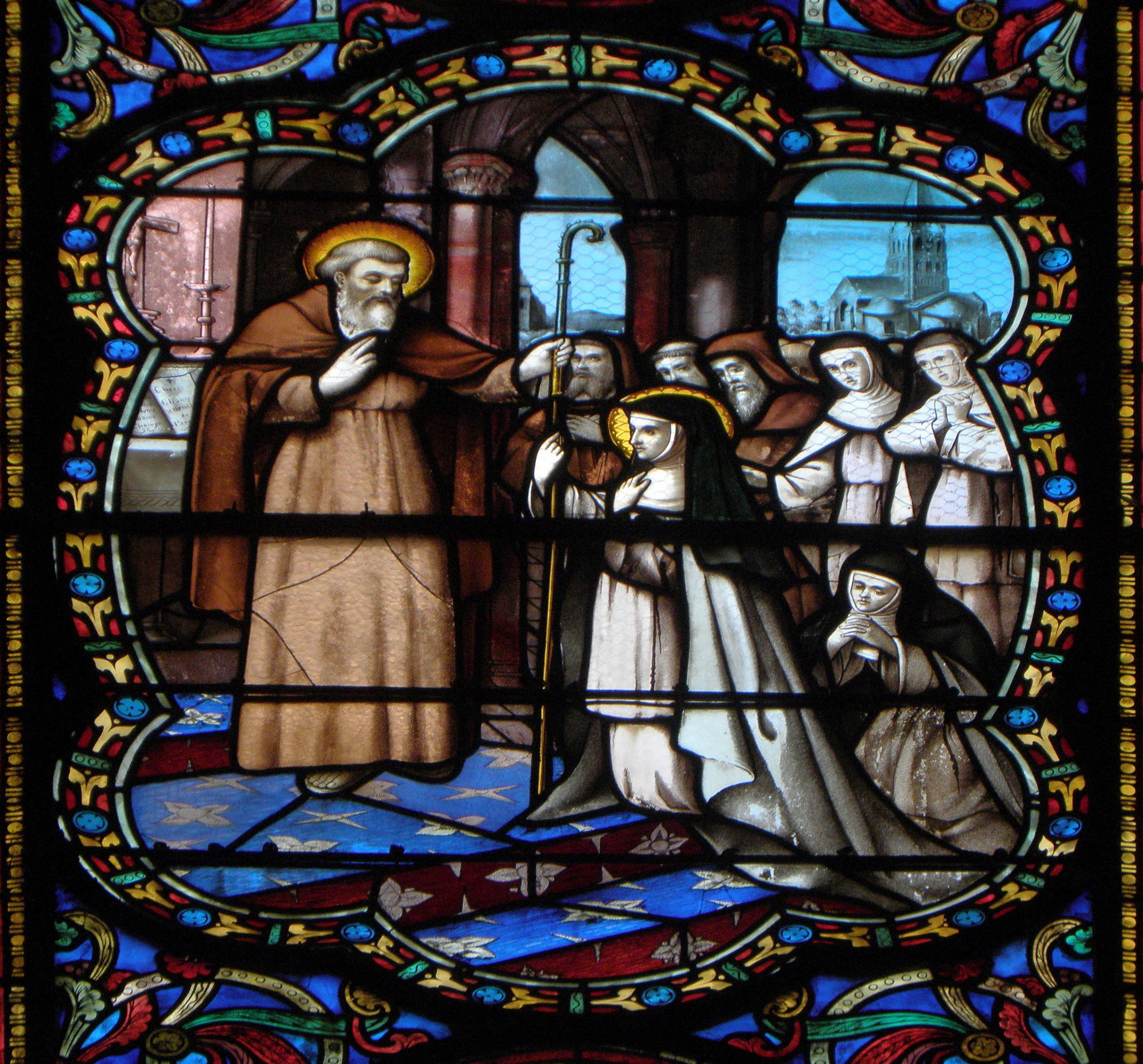 Pétronille de Chemillé reçoit Robert d'Arbrissel en 1115 qui lui remet son bâton d'abbesse (détail redressé).